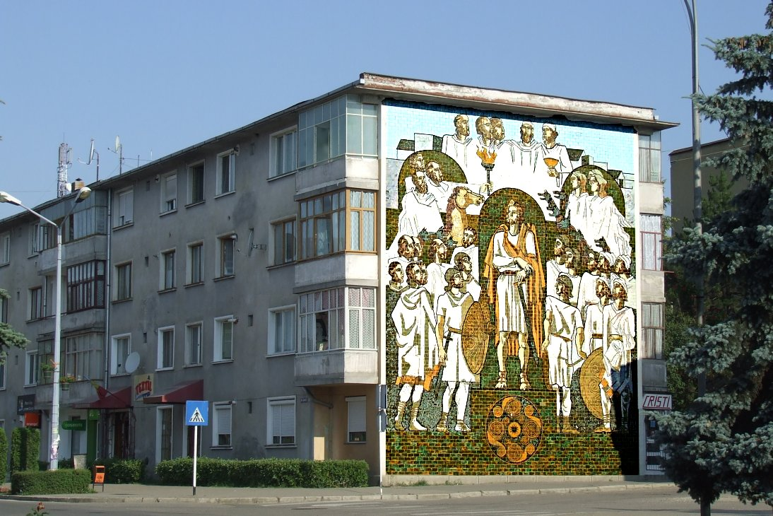 Image from Orăştie, Romania - Block House